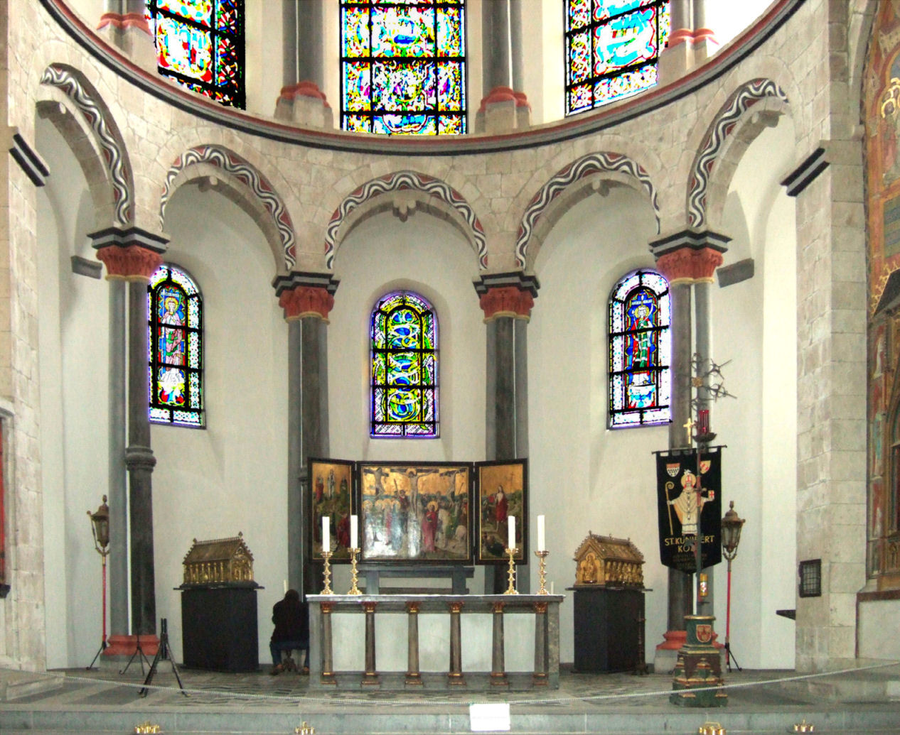 Die beiden Außenfenster der Apsis in der Kirche St. Kunibert in Köln zeigen die Heilige Cordula (links) und die Heilige Ursula (rechts). Beide Fenster sollen um das Jahr 1220 angefertigt worden sein. Das Mittelfenster ist neuzeitlich.